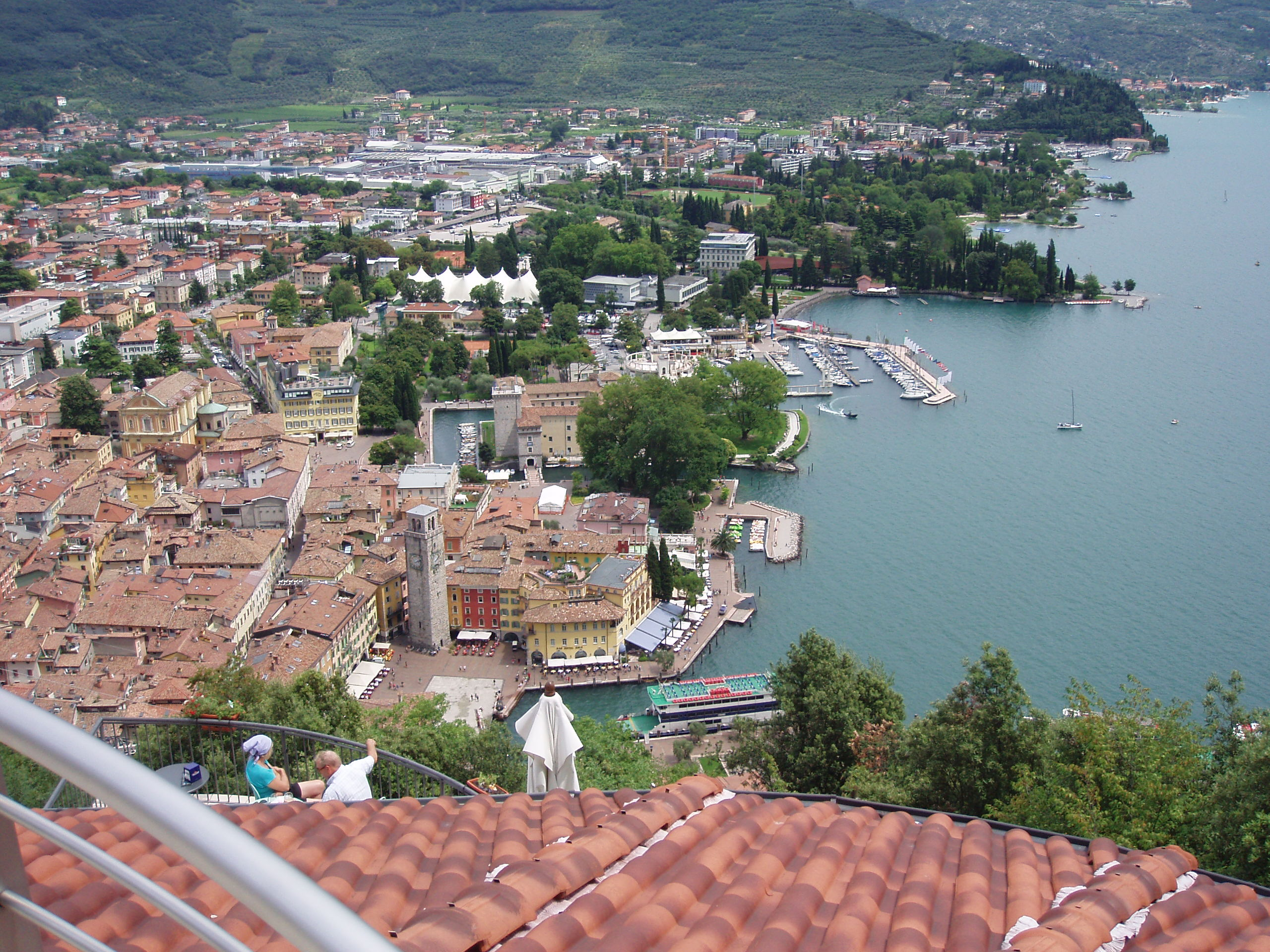 Pohled na Riva del Garda od Bastione